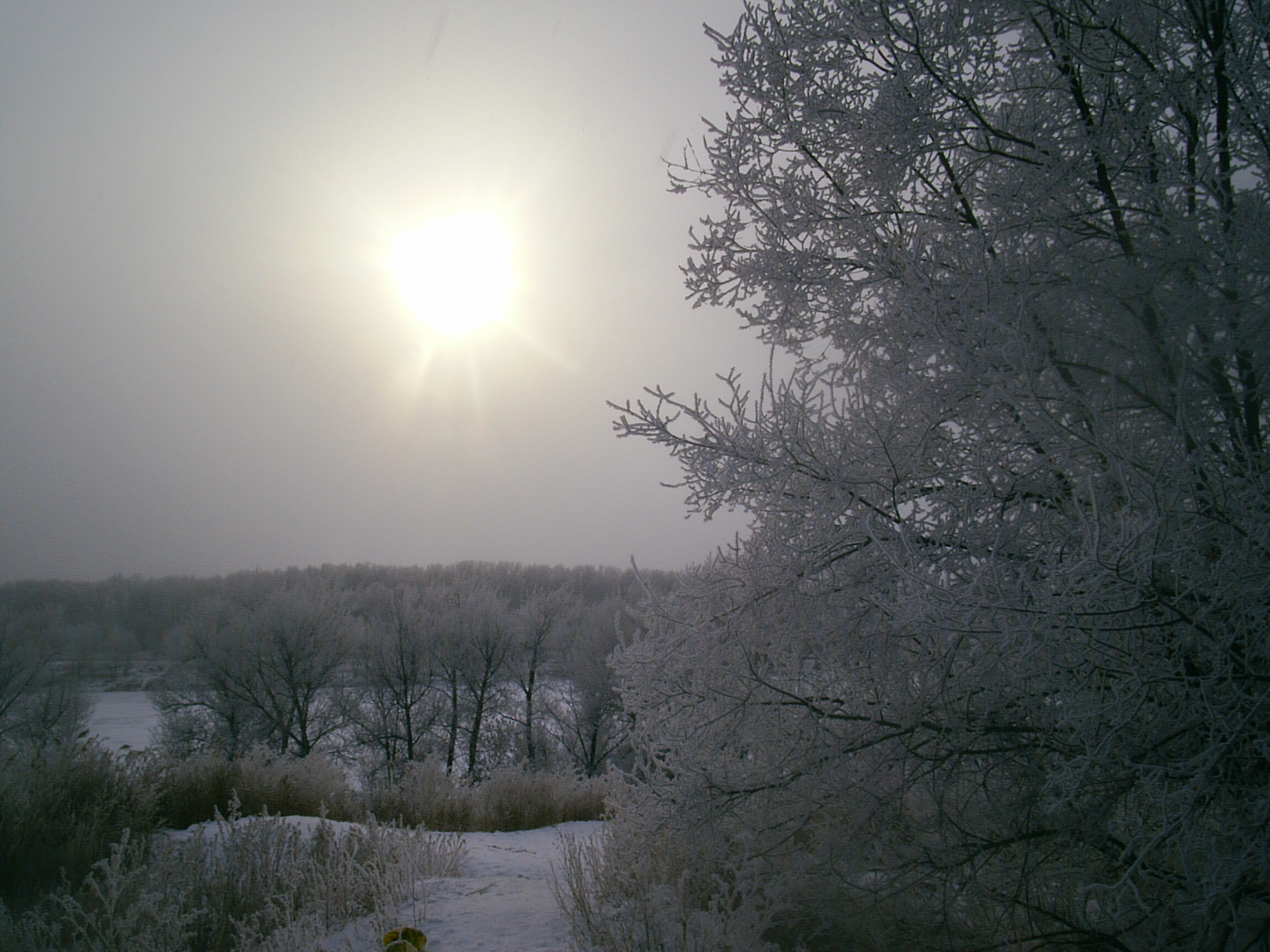 Зима в Ахтубинске. Вид от гостиницы "Яуза" в сторону центрального пляжа